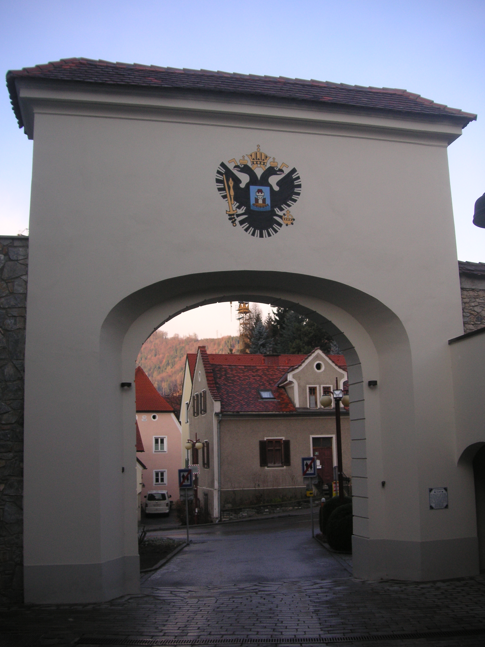 Leobner Tor